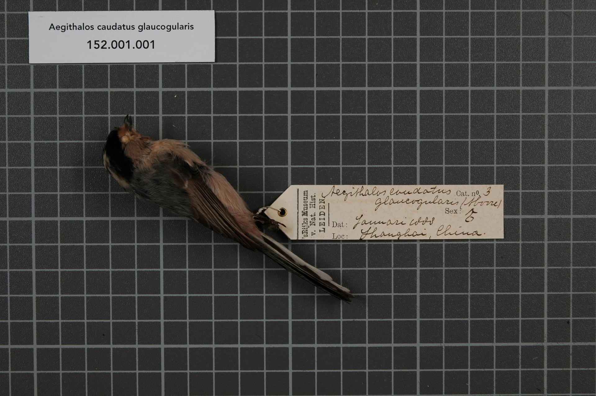 Aegithalos caudatus glaucogularis (Moore, 1855)